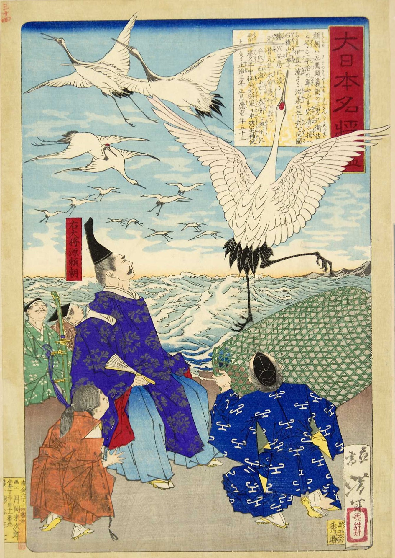 「大日本名将鑑」 「右大将源頼朝」鶴岡八幡宮の放生会（魚鳥など生きものを放って肉食や殺生を戒める儀式）で由比ヶ浜に鶴を千羽放生した源頼朝。